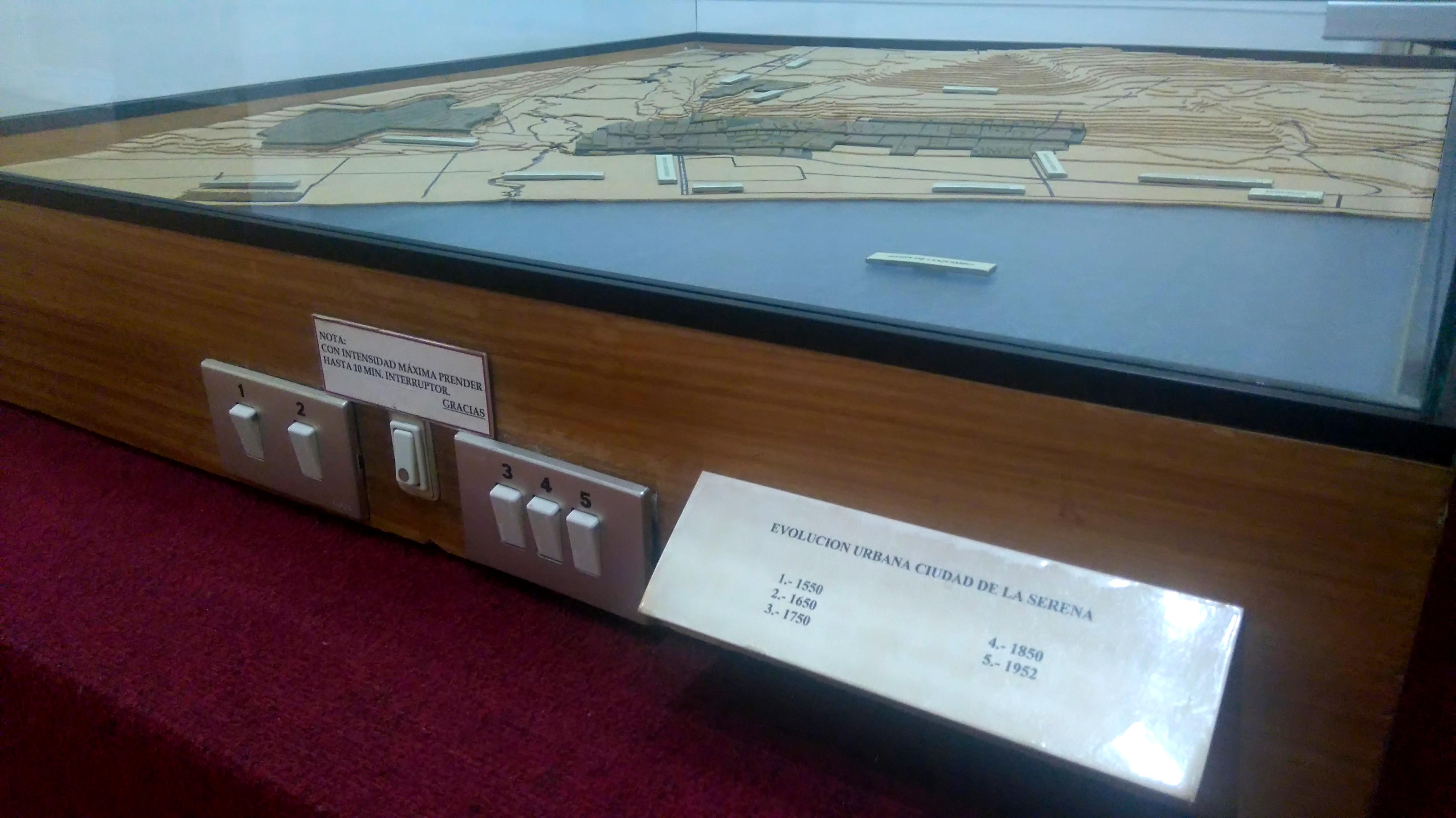 Maqueta expuesta en el museo histórico de La Serena, la cual muestra el desarrollo y crecimiento urbano de la ciudad a través de luces que iluminan los distintos barrios y zonas indicando la época en que surgió cada uno.